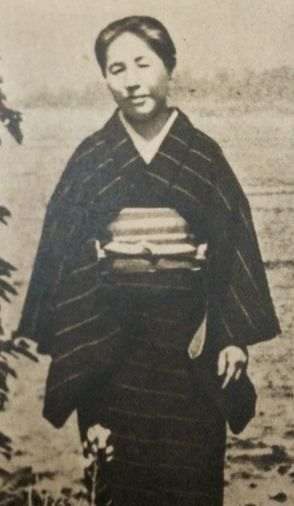 松岡筆子（夏目漱石の長女。松岡譲の妻）